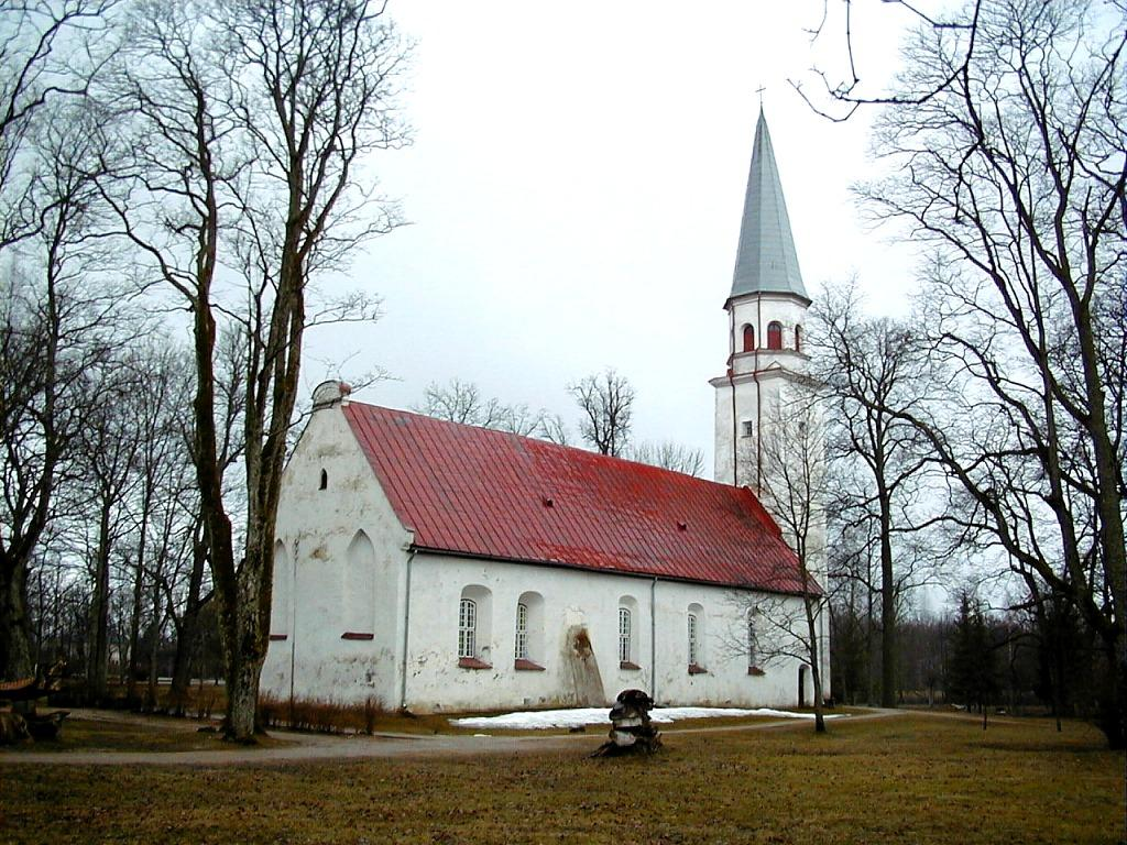 Siguldas luterāņu baznīca 2000-04-01